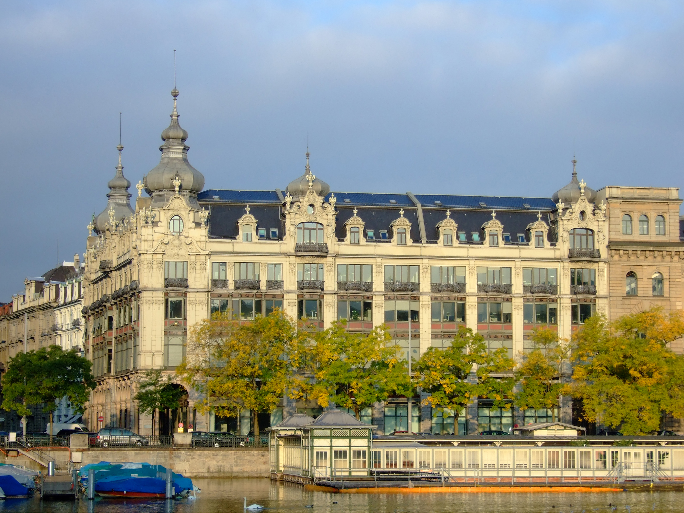 Das Haus "Metropol" am Stadthausquai in Zürich. 1892 bis 1894 nach den Plänen des Architekten Heinrich Ernst erbaut.